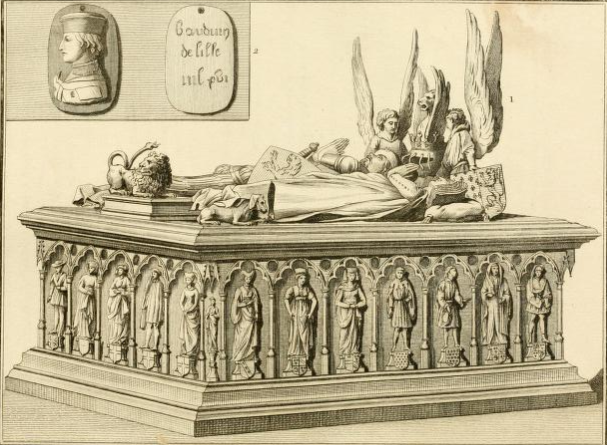 Tombeau de Louis de Male, Marguerite de Brabant et Marguerite de Male